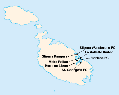 Répartition des clubs en First Division Maltaise 1921-1922.